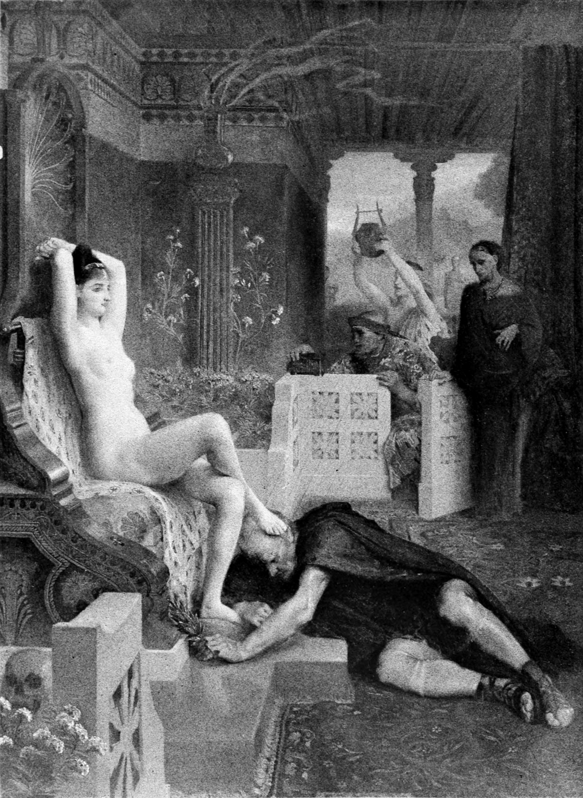 Circé